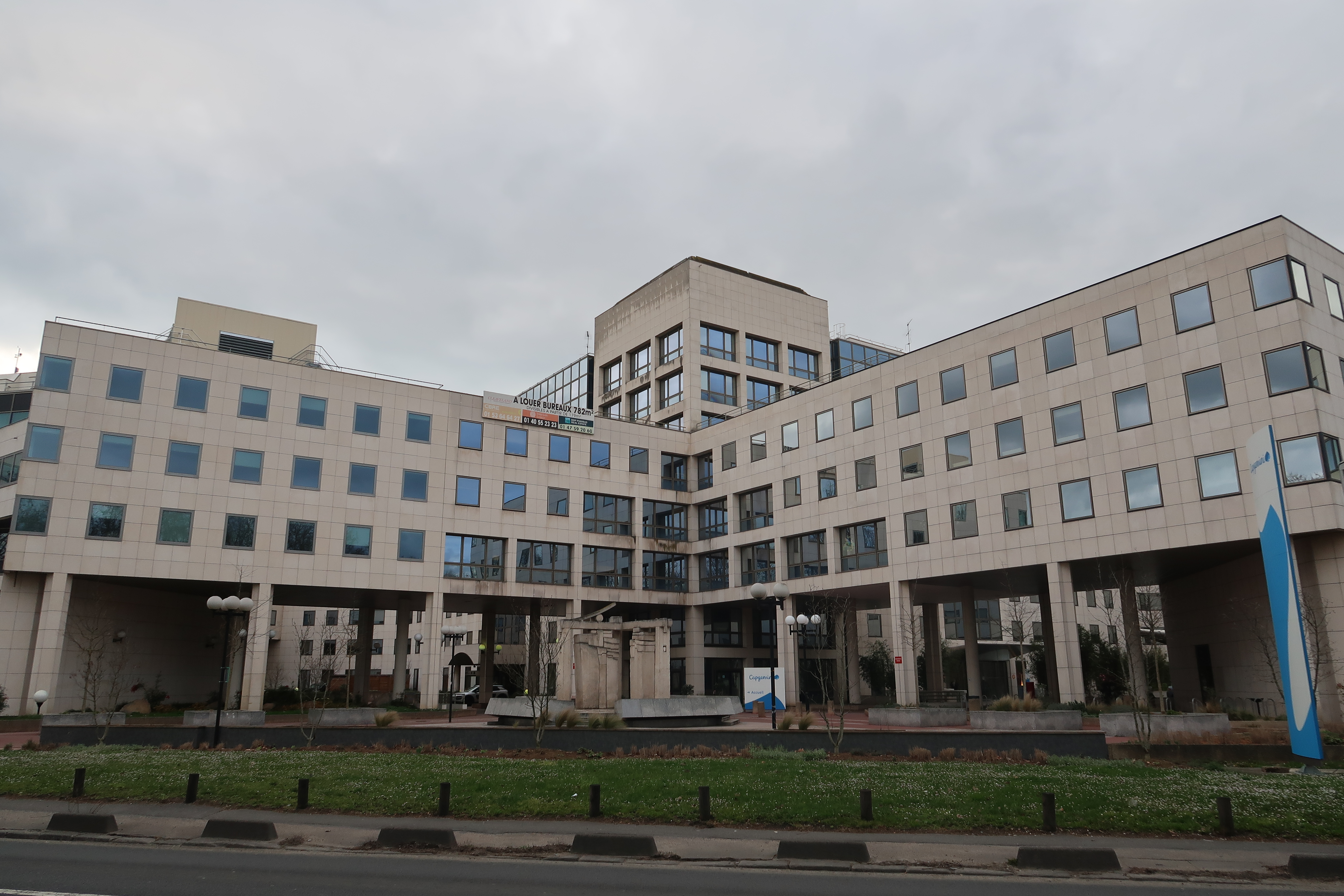 Bâtiments d'une entreprise à Suresnes (Hauts-de-Seine), vus depuis le quai Marcel-Dassault.